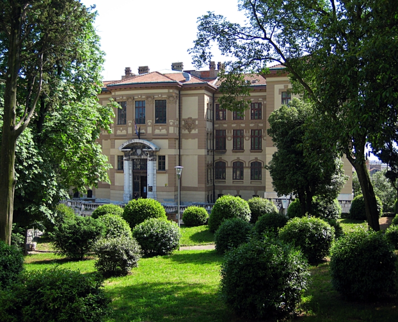 Sudbena palača u Rijeci